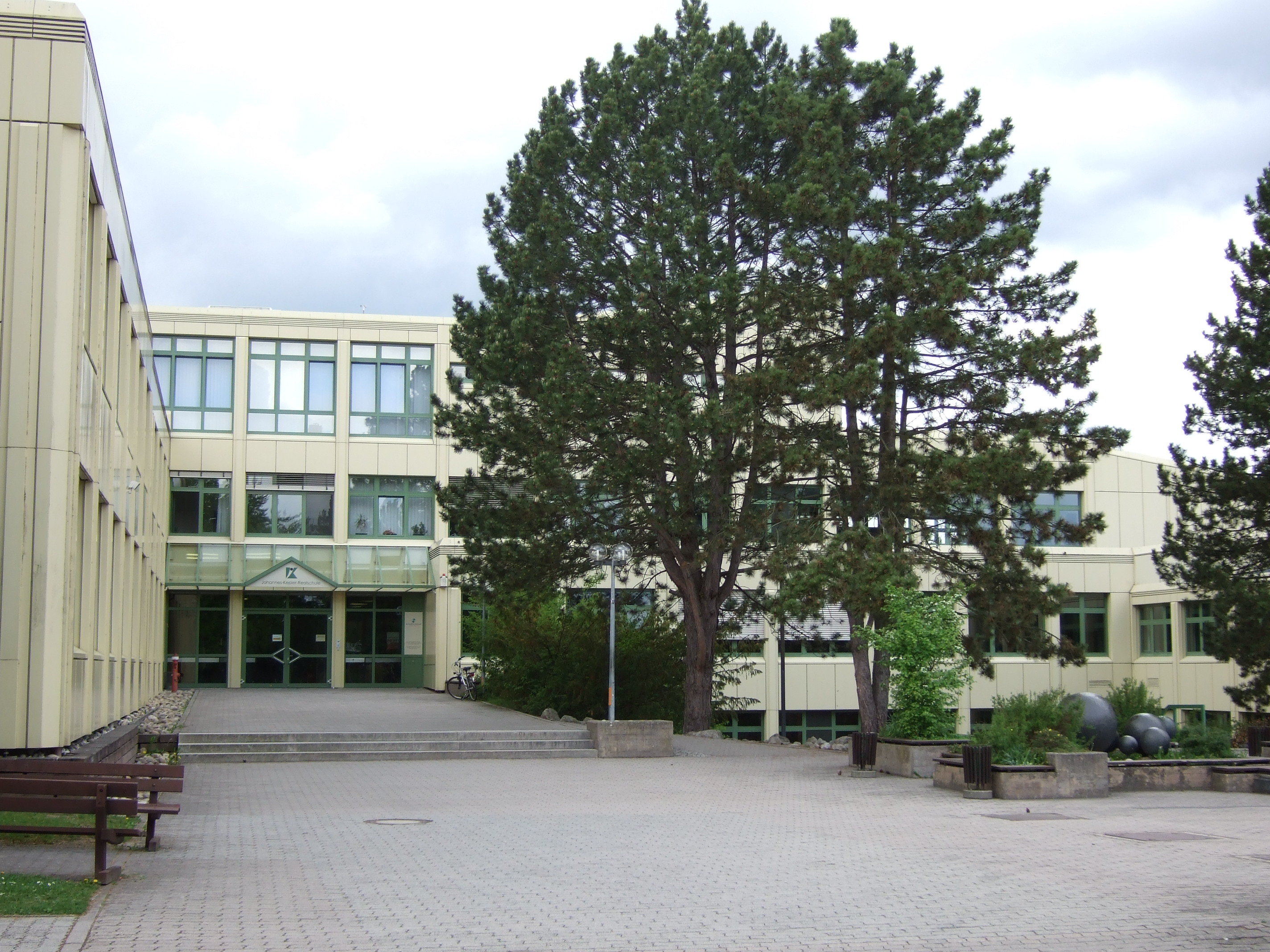 Staatliche Realschule II, Bayreuth, Adolf-Wächter-Str. 8